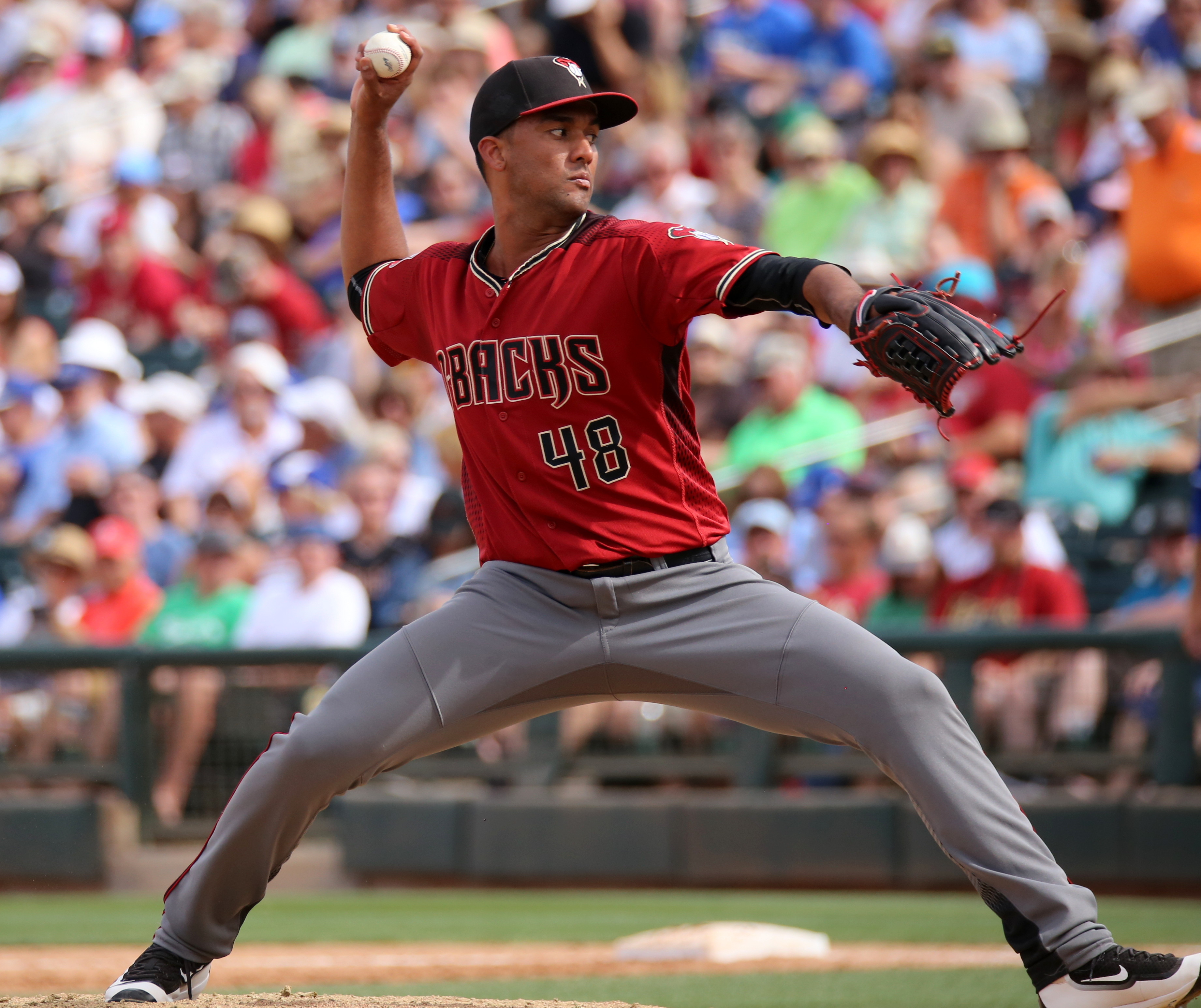 Randall Delgado